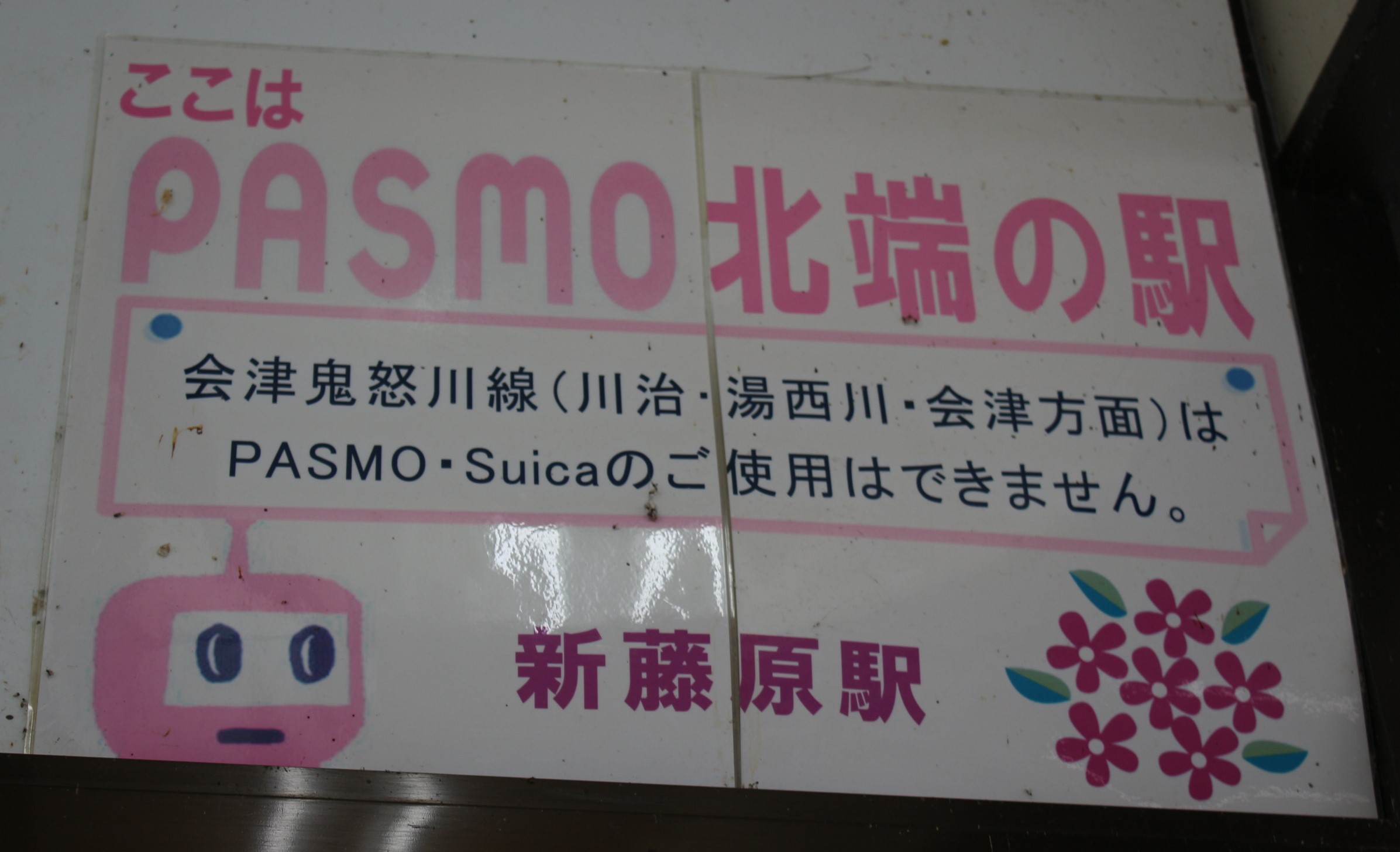 東武鉄道鬼怒川線・野岩鉄道会津鬼怒川線新藤原駅に掲示されている「PASMO北端の駅」案内板